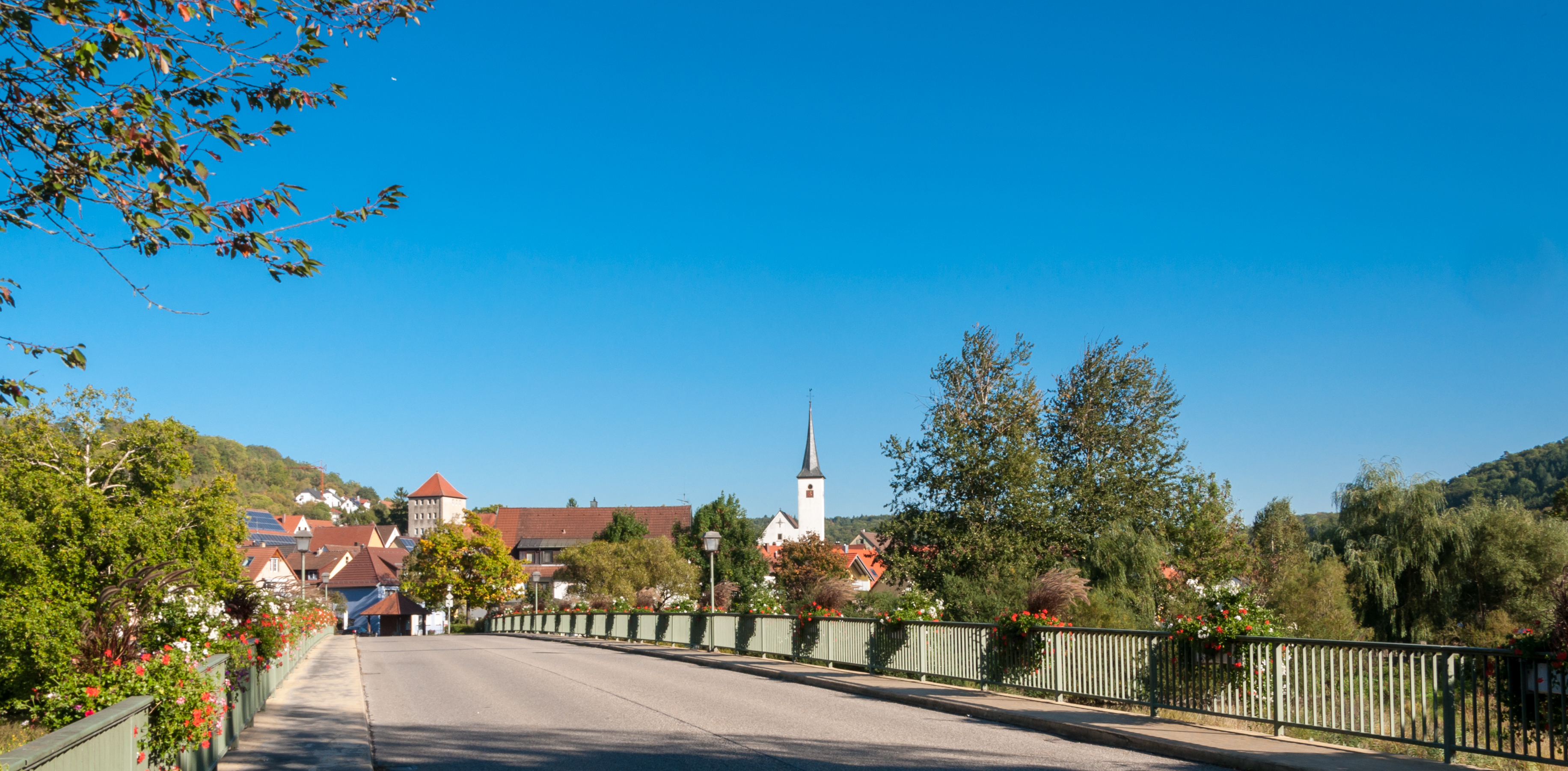 Blick auf Sindringen von der Kocherbrücke